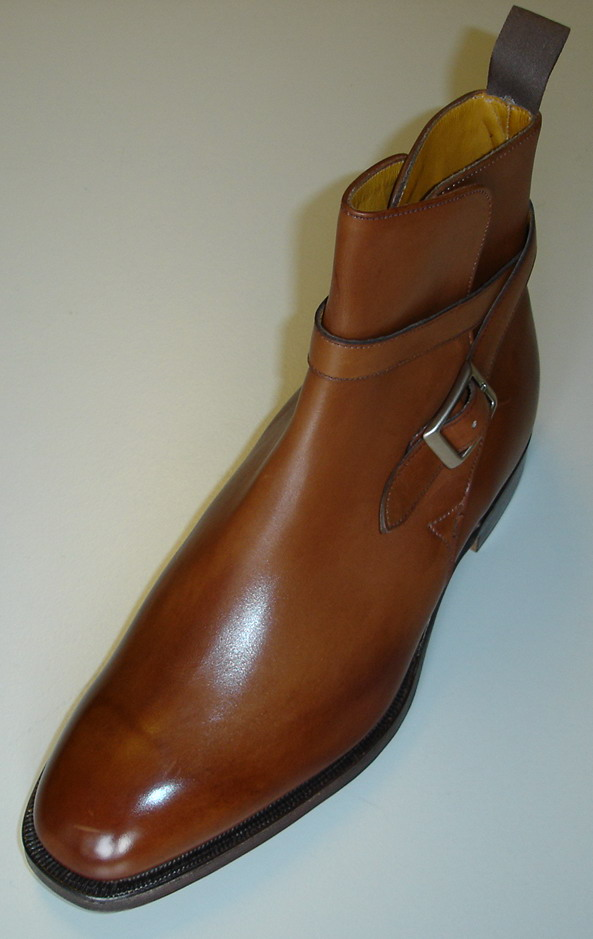 Jodhpur mir am Schaft angenähten Riemen